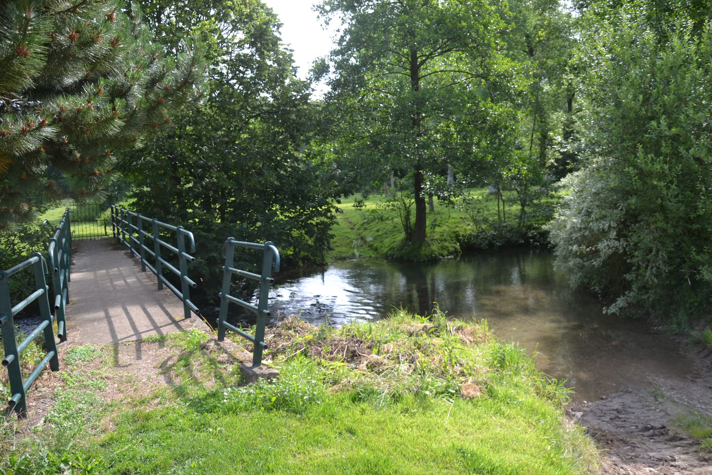 La rivière à Bellefontaine, hameau de Mencas